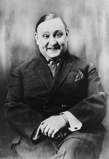 "Estonia" teatri näitleja Paul Pinna 1930-31